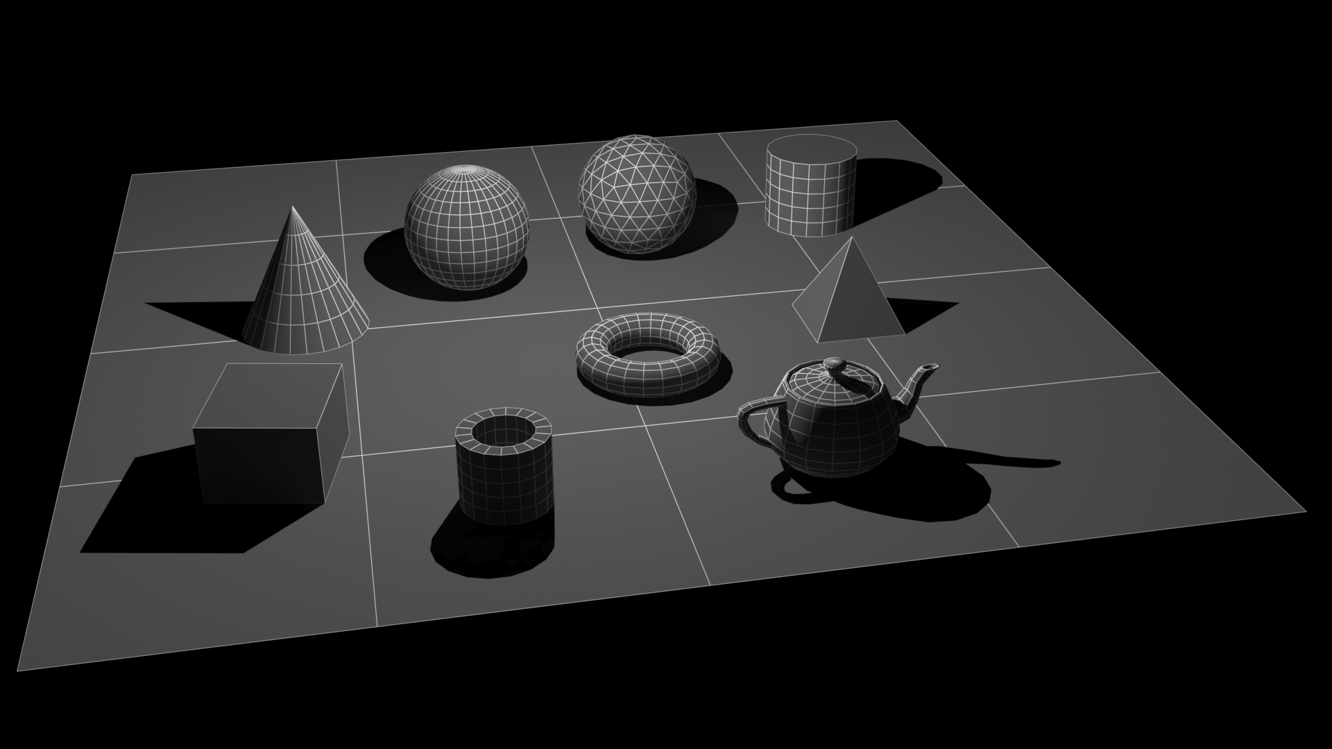 Geometrija "Primitivnih teles"